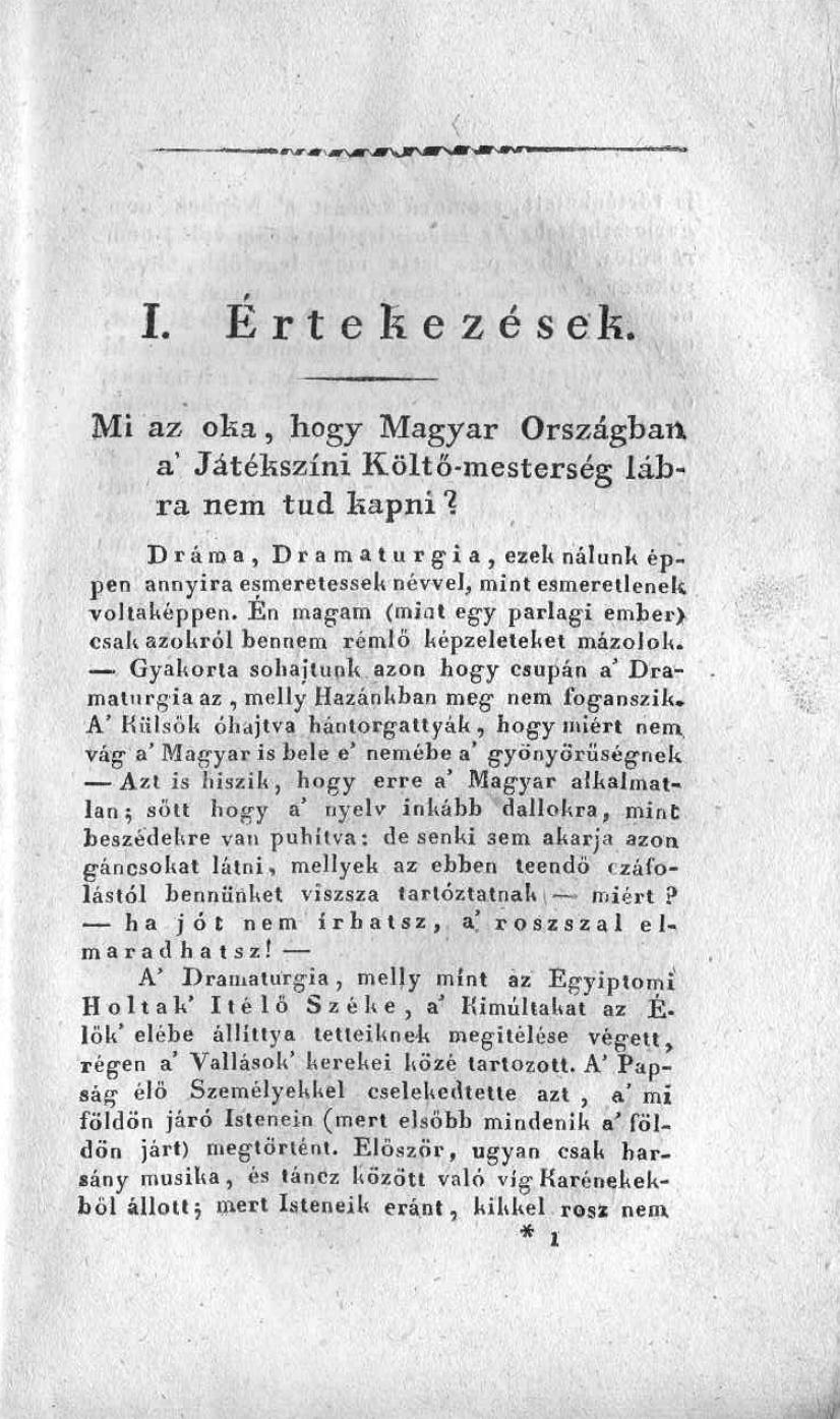 Katona József színházról írt értekezésének első oldala.